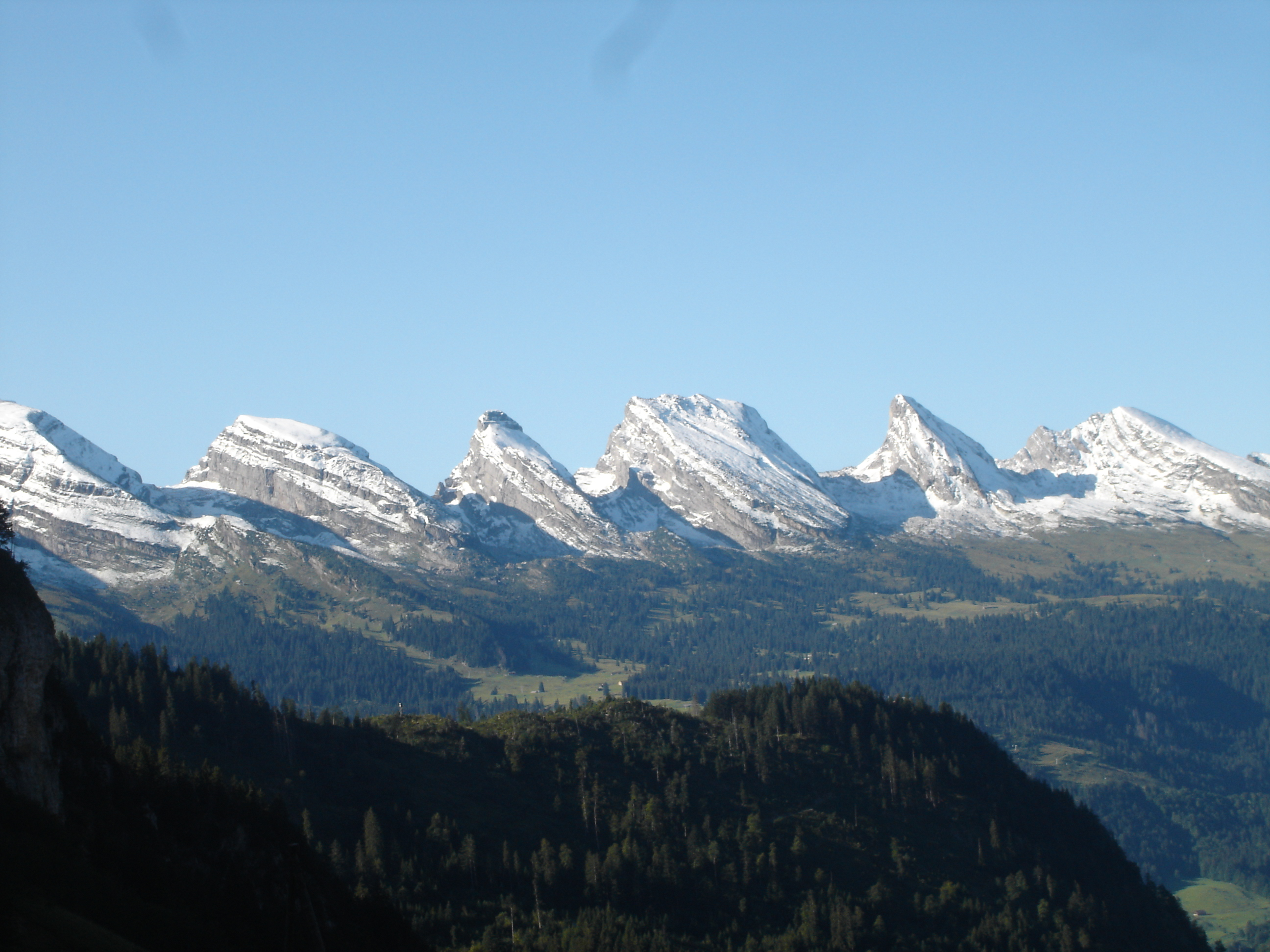 Churfirsten (Hinterrugg, Schibestoll, Zuestoll, Brisi, Frümsel und Selun (v.l.n.r.))